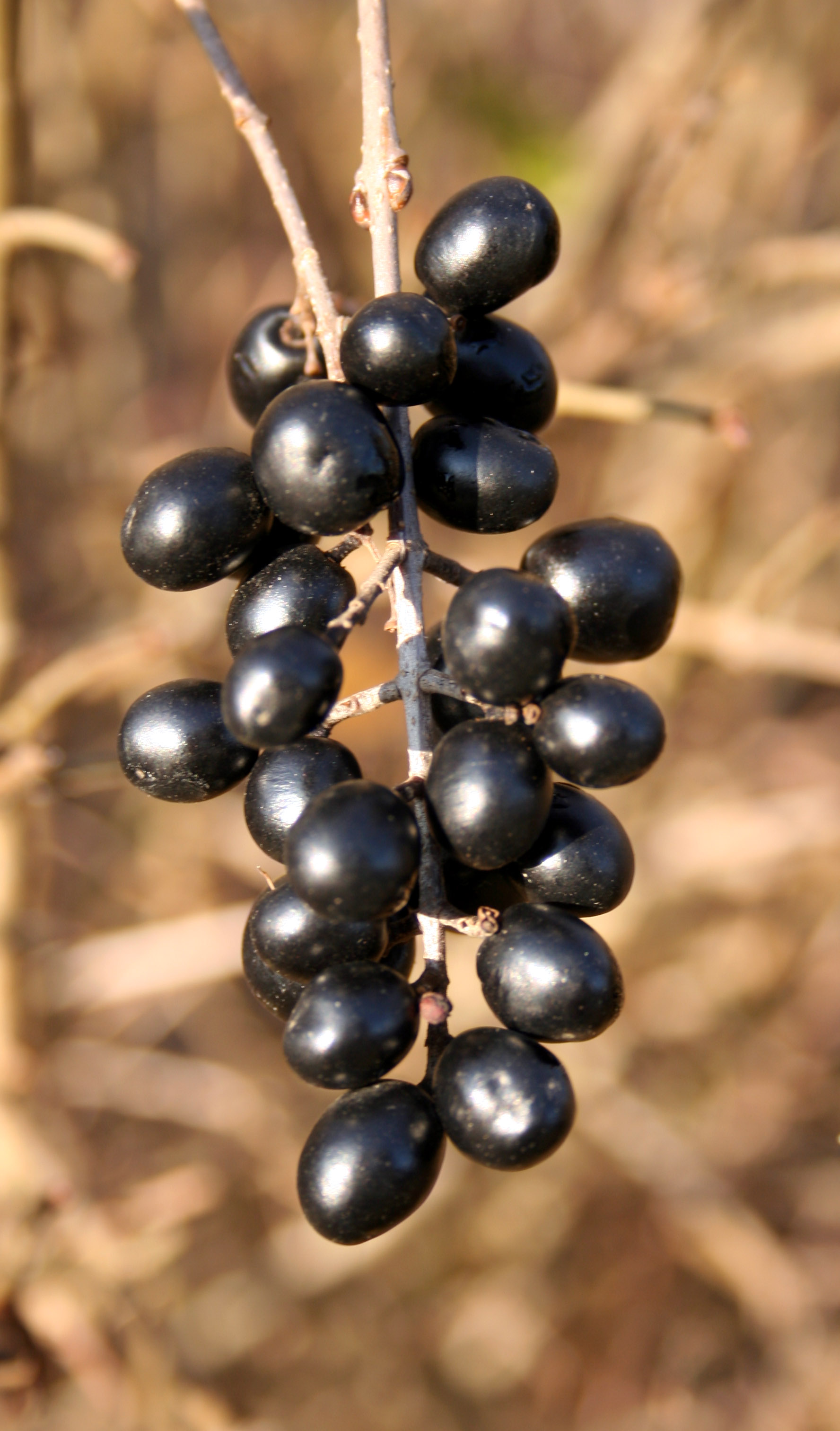 Ligustrum vulgare jagody